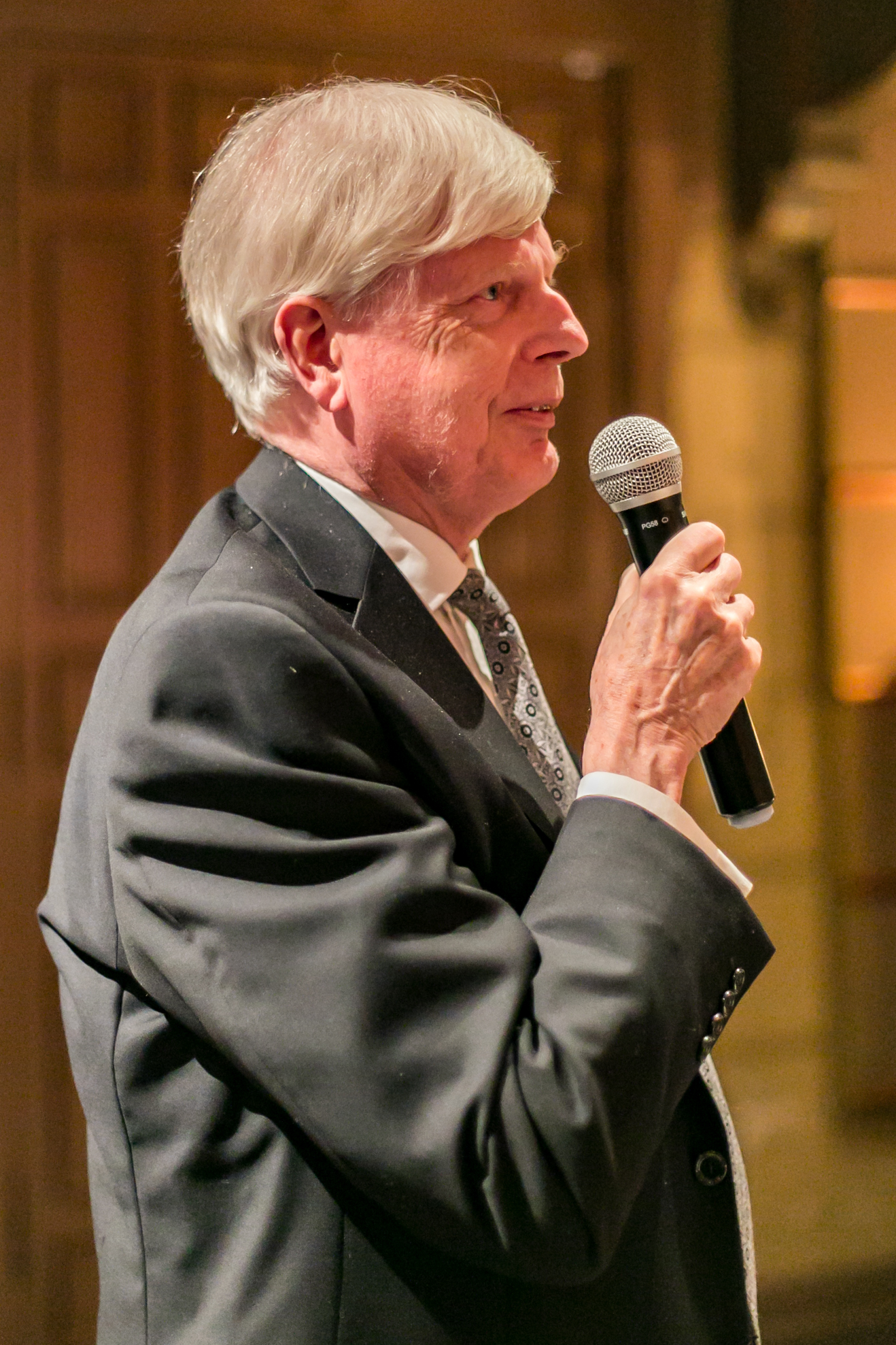 Sveriges Släktforskarförbunds ordförande Erland Ringborg på Riksarkivets 400-årsjubileum i Stockholm.